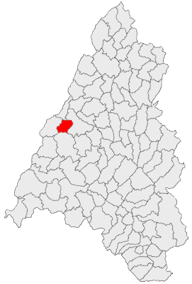 Categorie:Hărţi ale judeţului Bihor